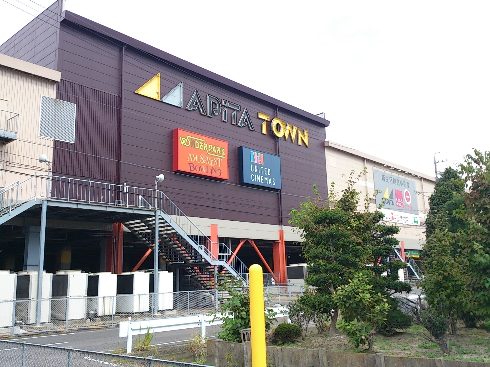 アピタタウン稲沢